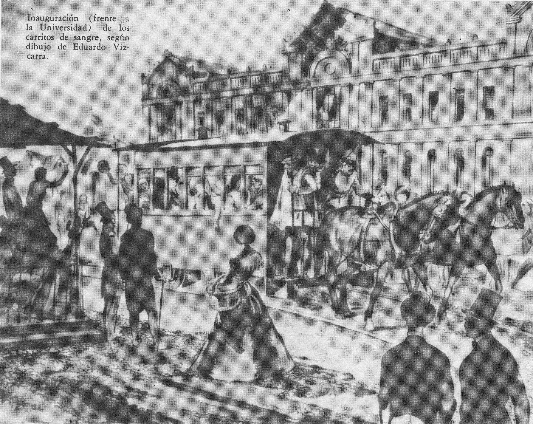 Carro de sangre en la Alameda de las Delicias al costado de la Casa Central de la Universidad de Chile